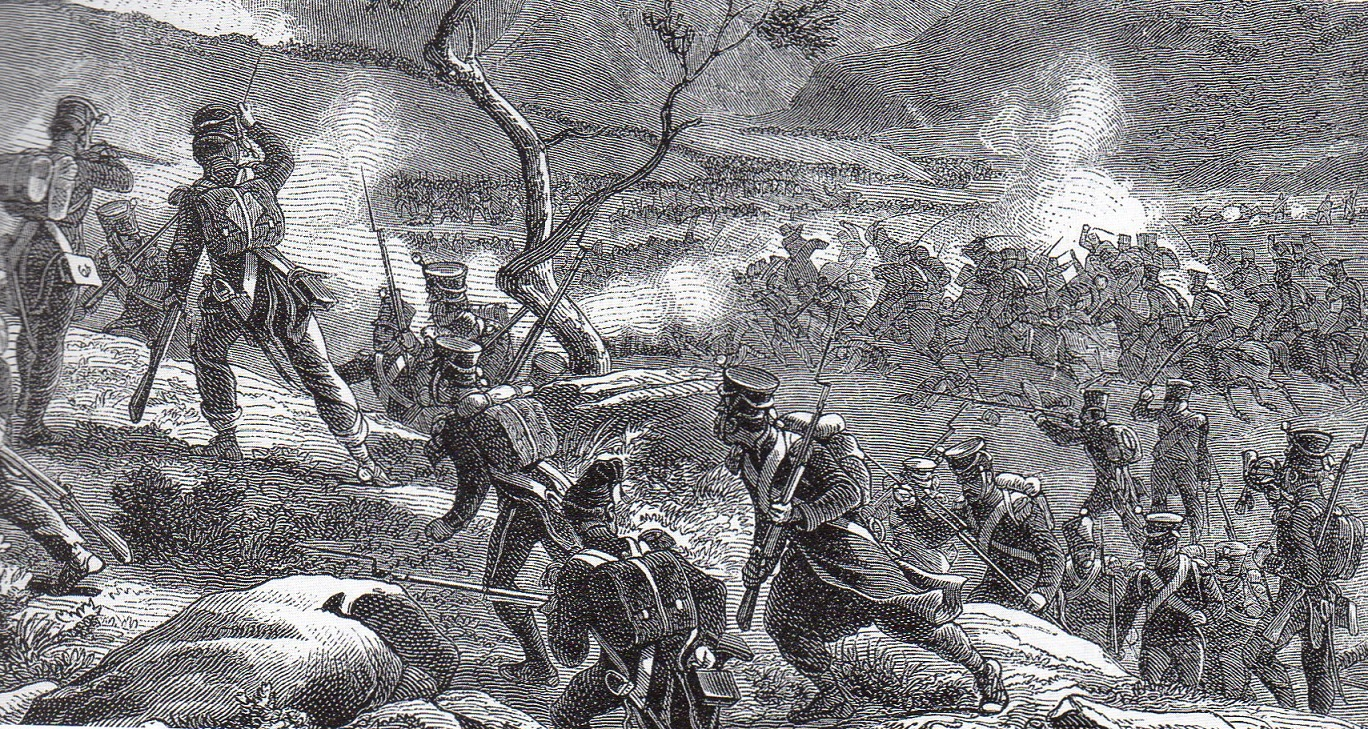 Bataille de Redinha, 12 mars 1811. L'arrière-garde française commandée par le maréchal Ney ralentit la poursuite des troupes anglo-portugaises de Wellington.